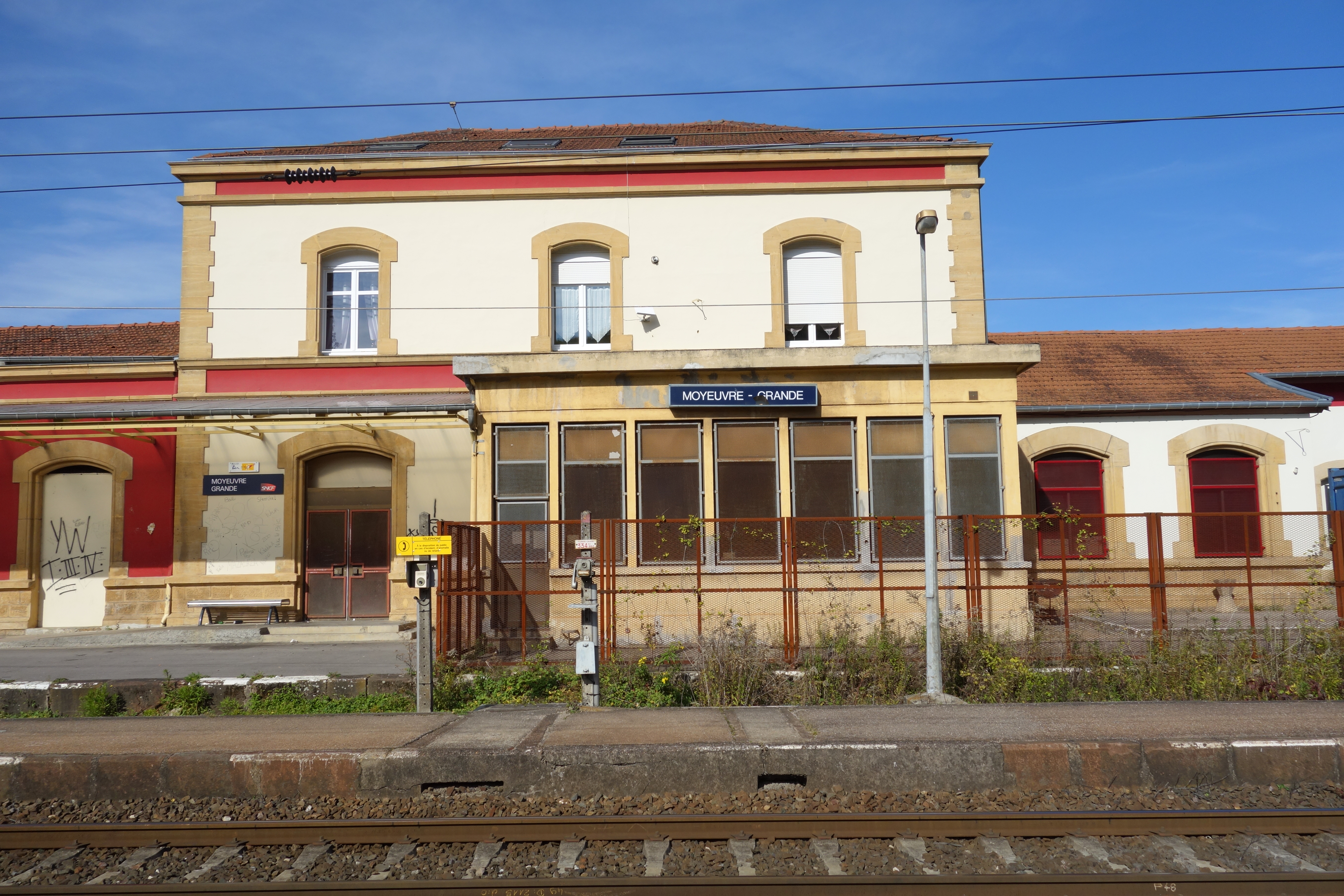 Photo de la gare de moyeuvre prise depuis le quai 2